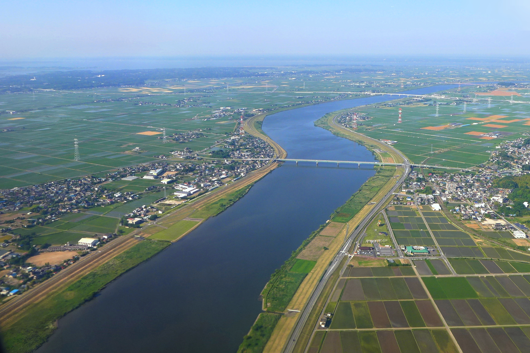 Tone River 利根川